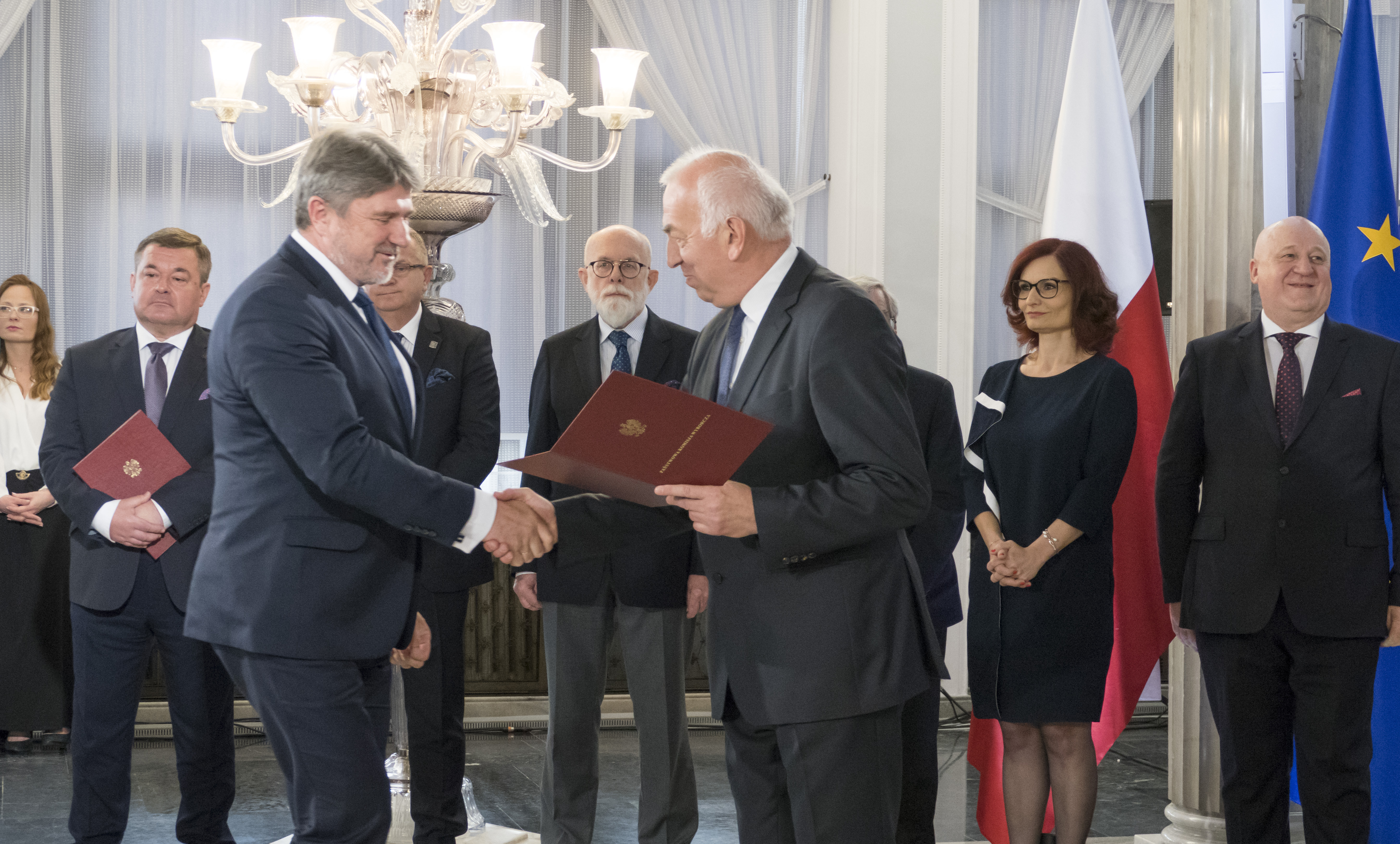 Bogdan Rzońca, ponadto od prawej: sędzia PKW Sylwester Marciniak, sekretarz PKW i szef KBW Magdalena Pietrzak, sędzia PKW Wiesław Kozielewicz, sędzia PKW Janusz Niemcewicz, sędzia PKW Krzysztof Strzelczyk i sędzia PKW Arkadiusz Despot-Mładanowicz